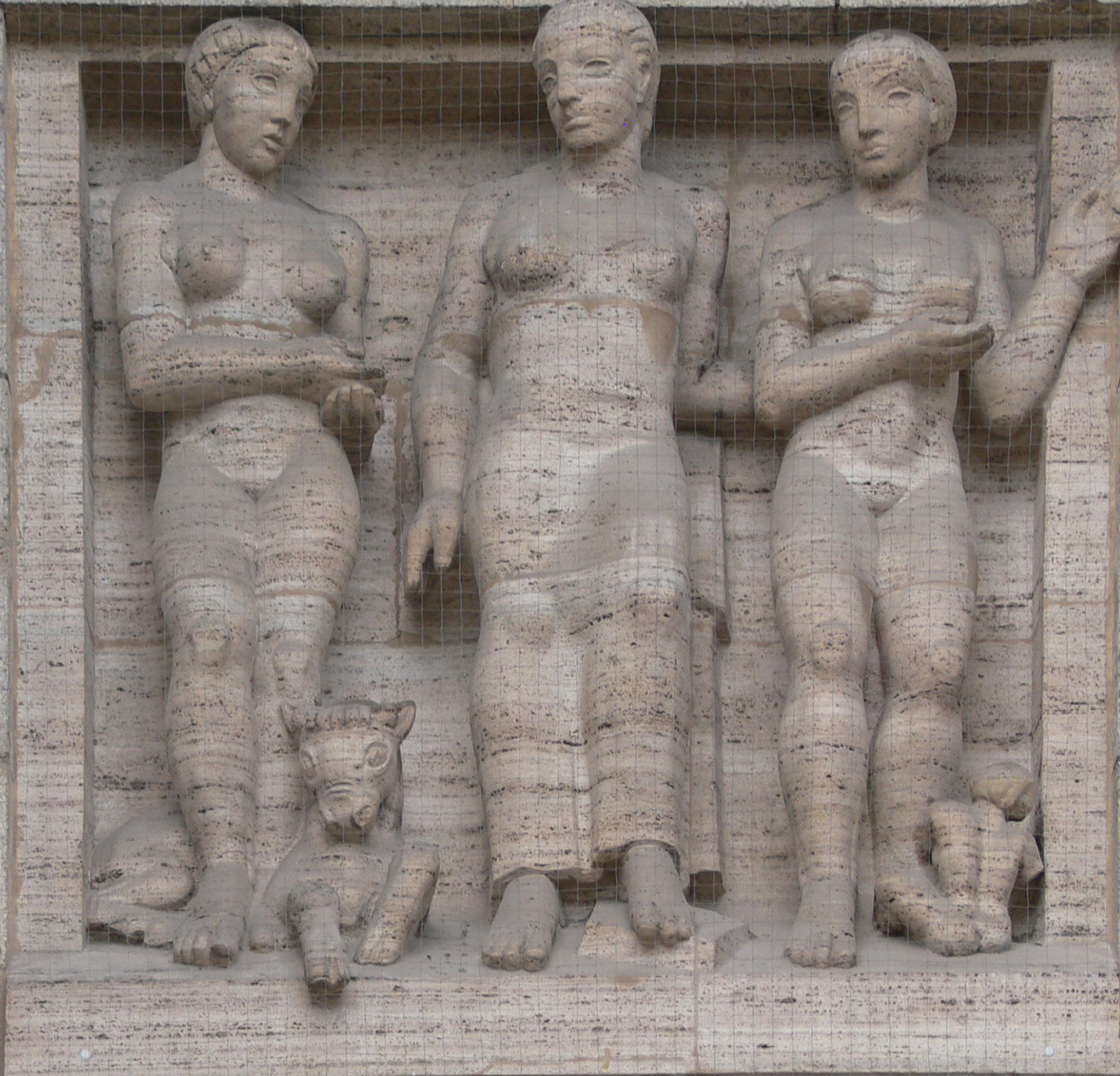 Museum kunst palast